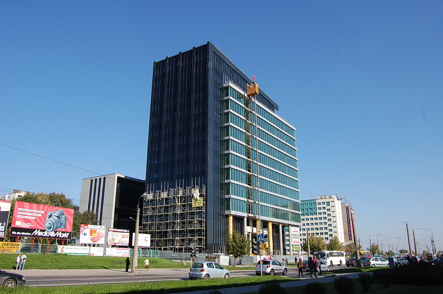 Lublin, ul T. Zana, wieżowiec Gray Office w budowie.